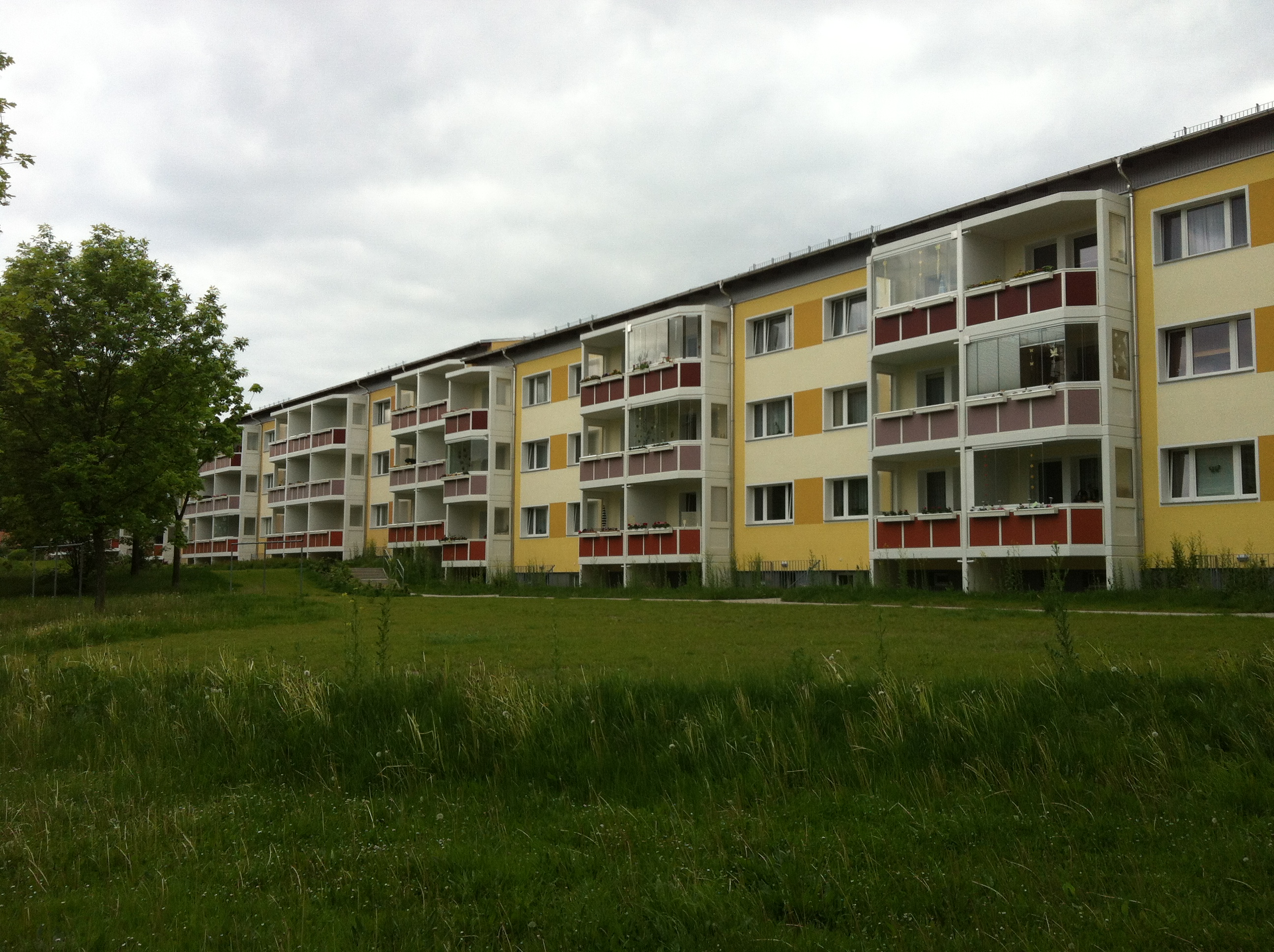 Die IW-64-Häuser am Nordring in Görlitz-Königshufen wurden 2011 um zwei Etagen gekürzt und anschließend modernisiert.